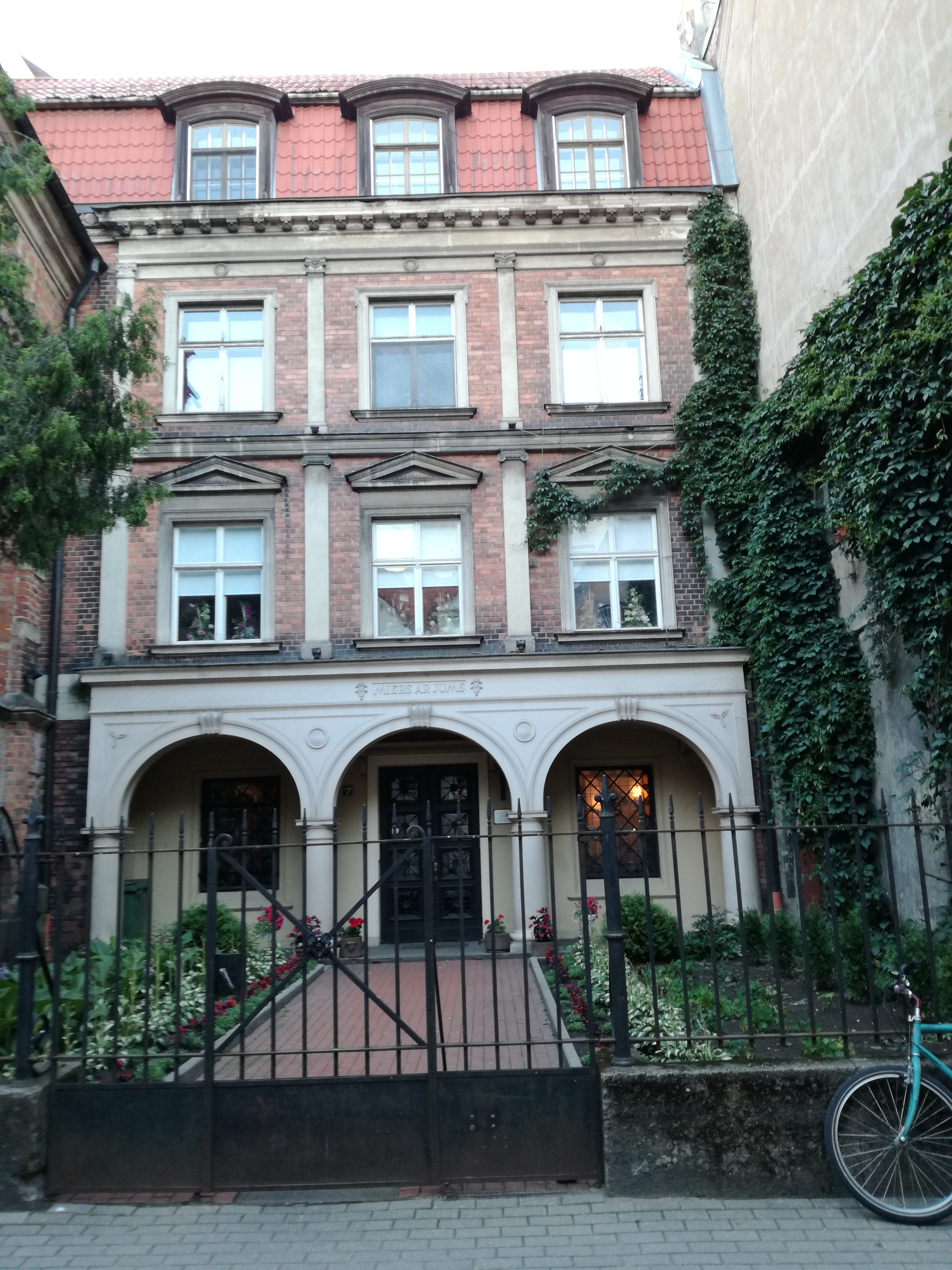 Дом пастора церкви Cв. Иоанна (Рига)